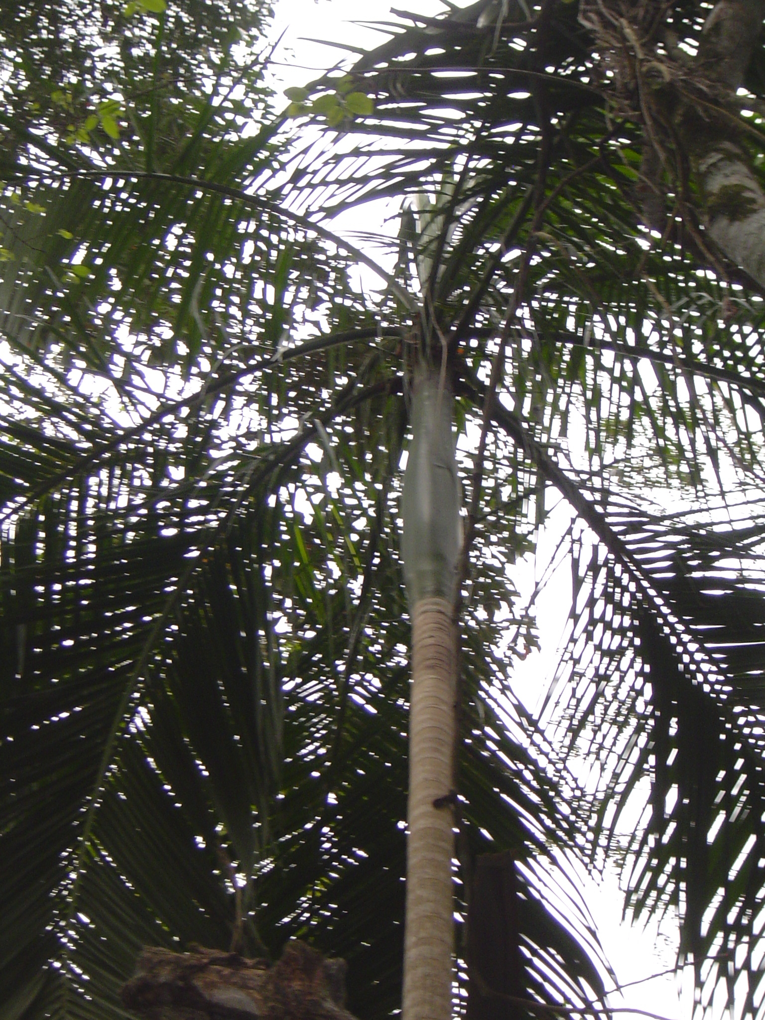 Palmera productora de palmito, Euterpe edulis.